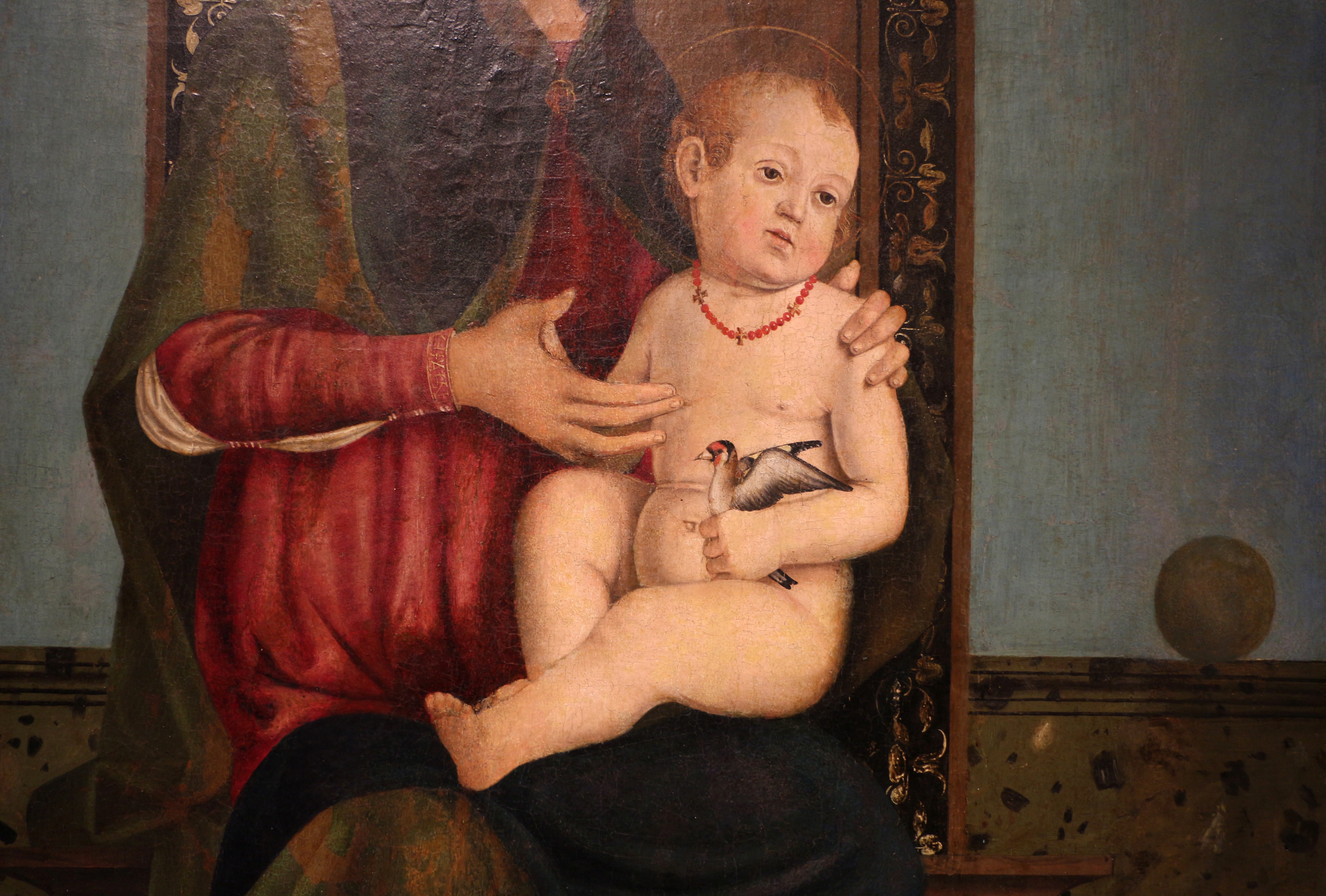 detail